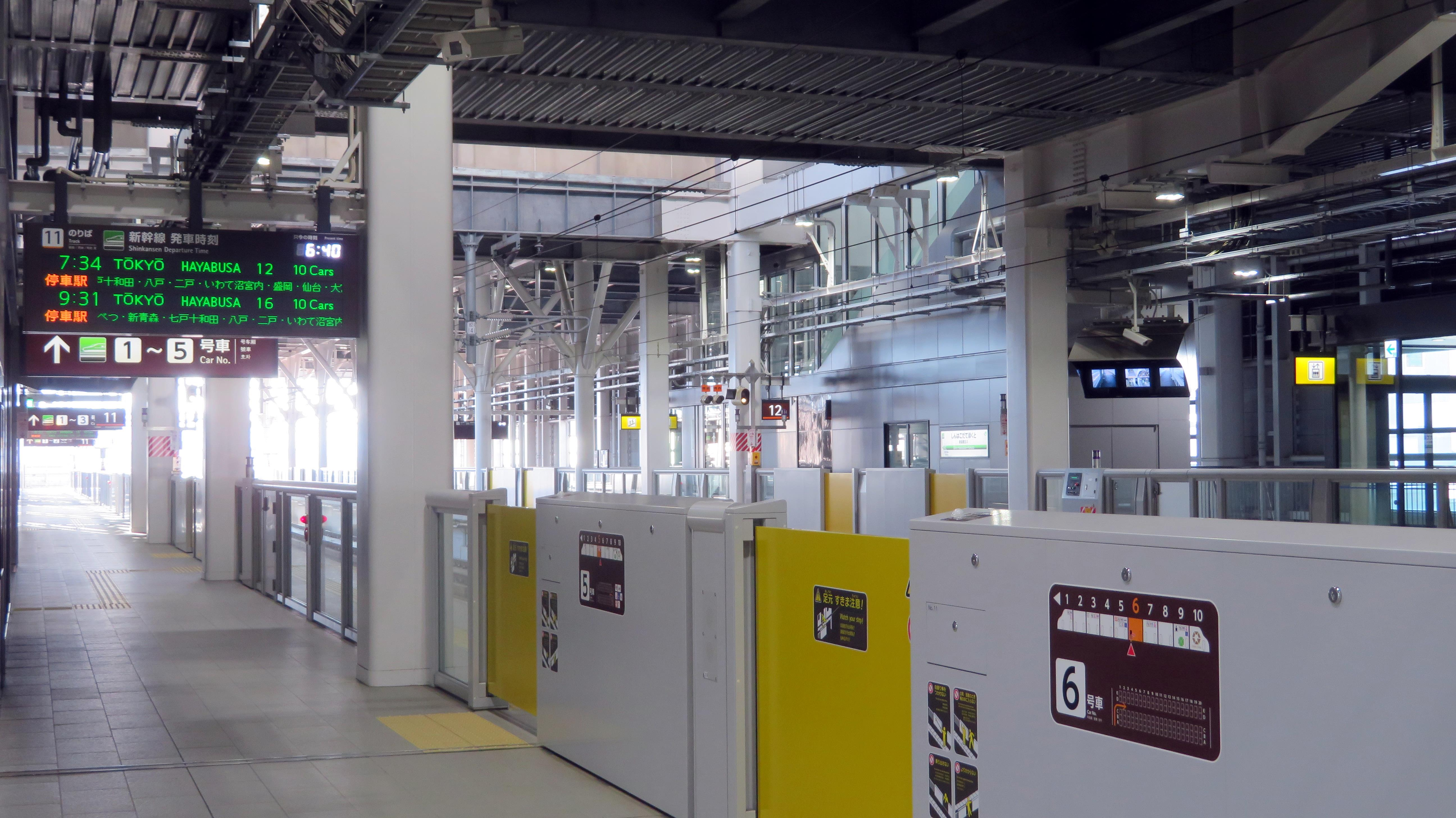 新函館北斗駅ホーム(新幹線)